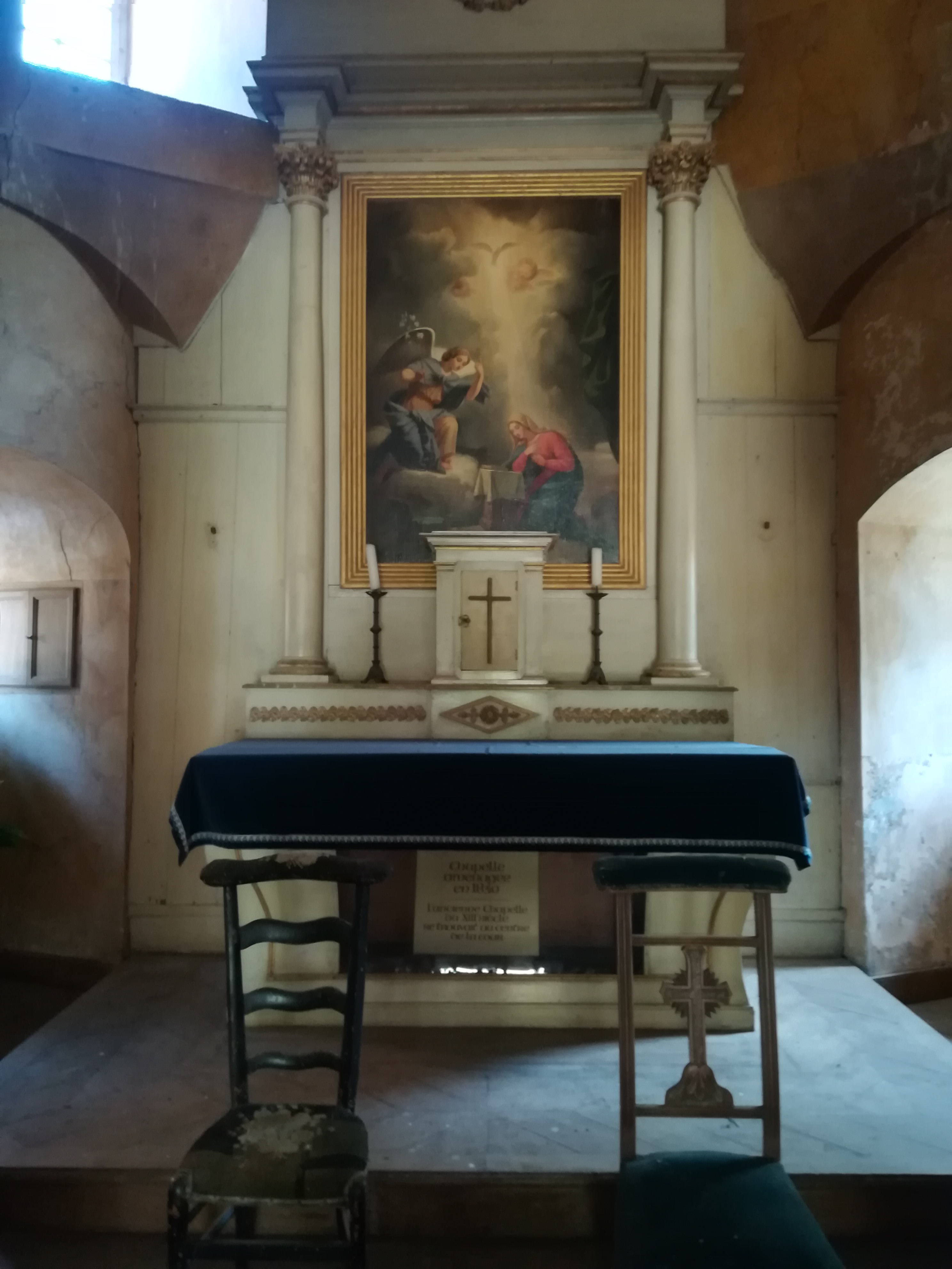 Chapelle aménagée dans la tour Sud-Est du Château d'Olhain